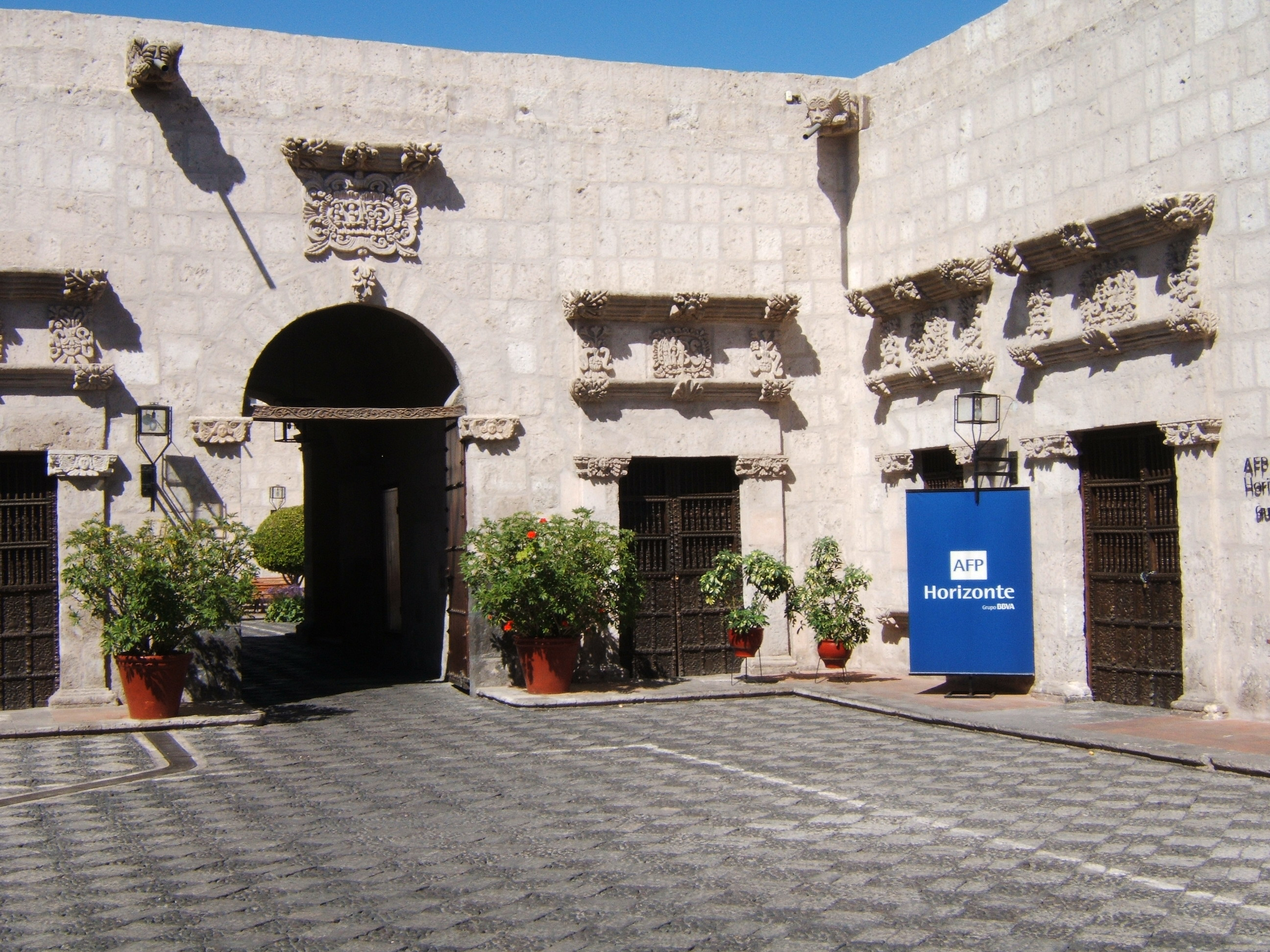 De binnenplaats van Casa Ricketts